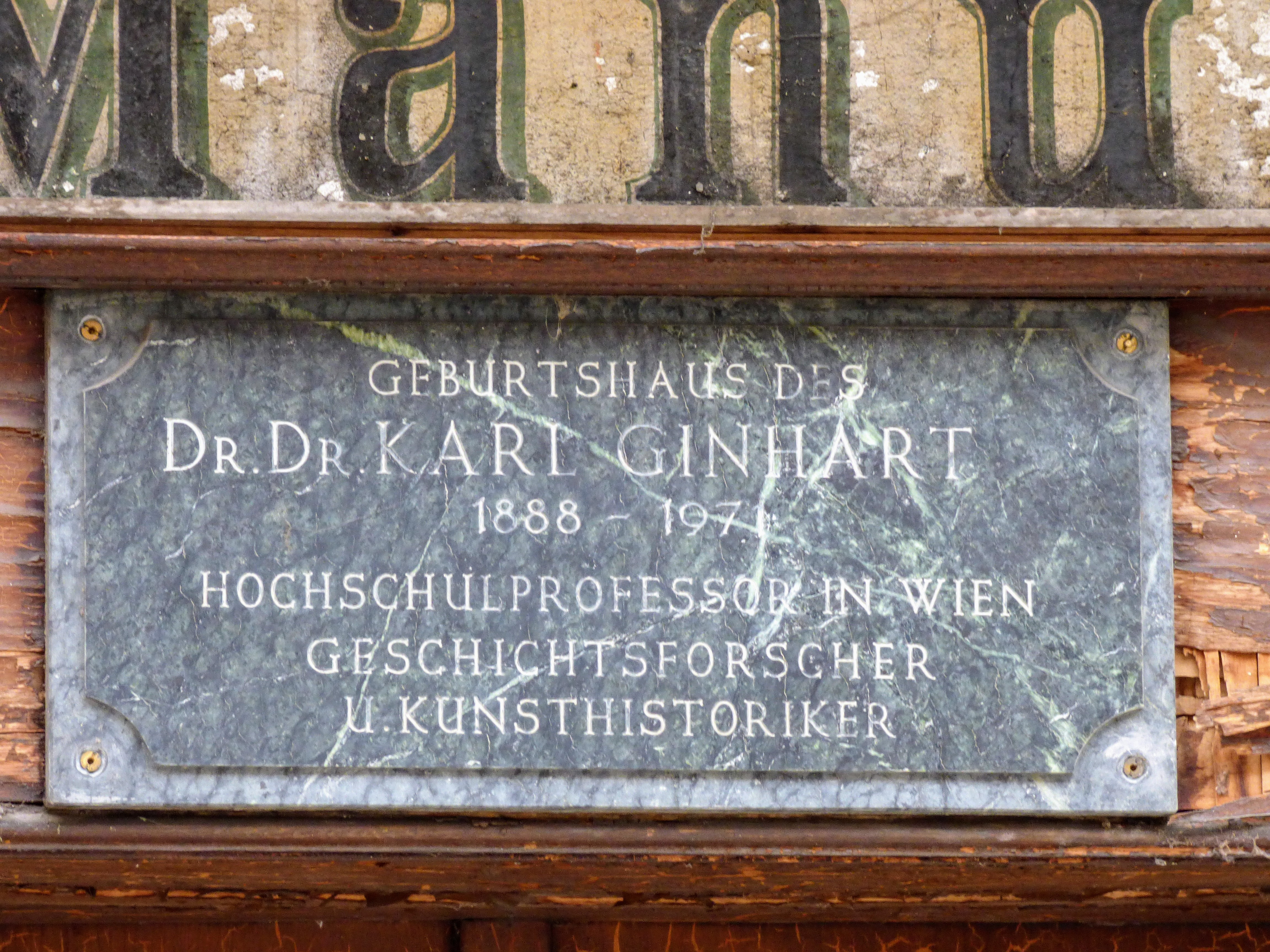 Ginharthaus, Unterer Platz 21, Sankt Veit an der Glan